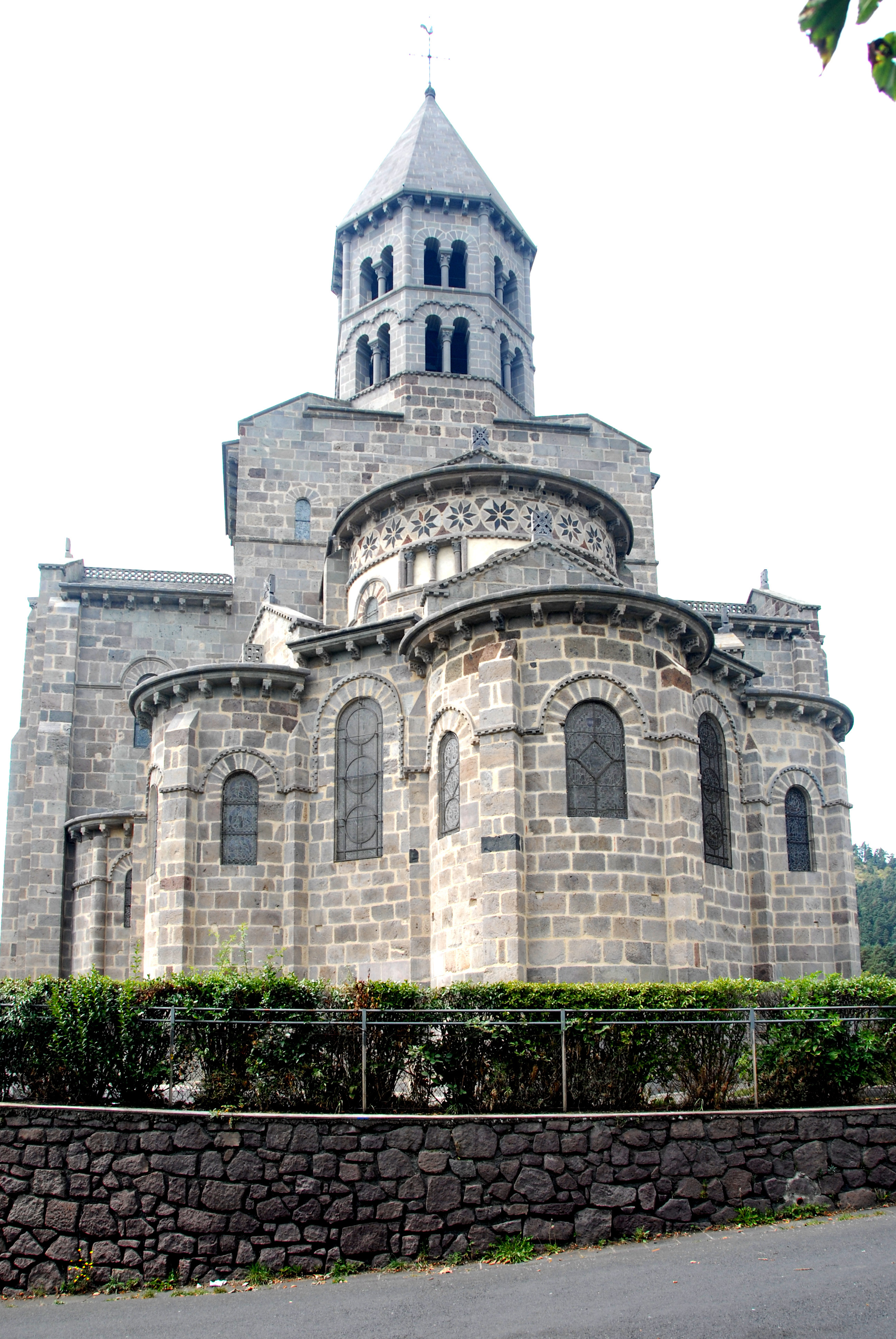 St.-Nectaire, Chorhaupt von SO